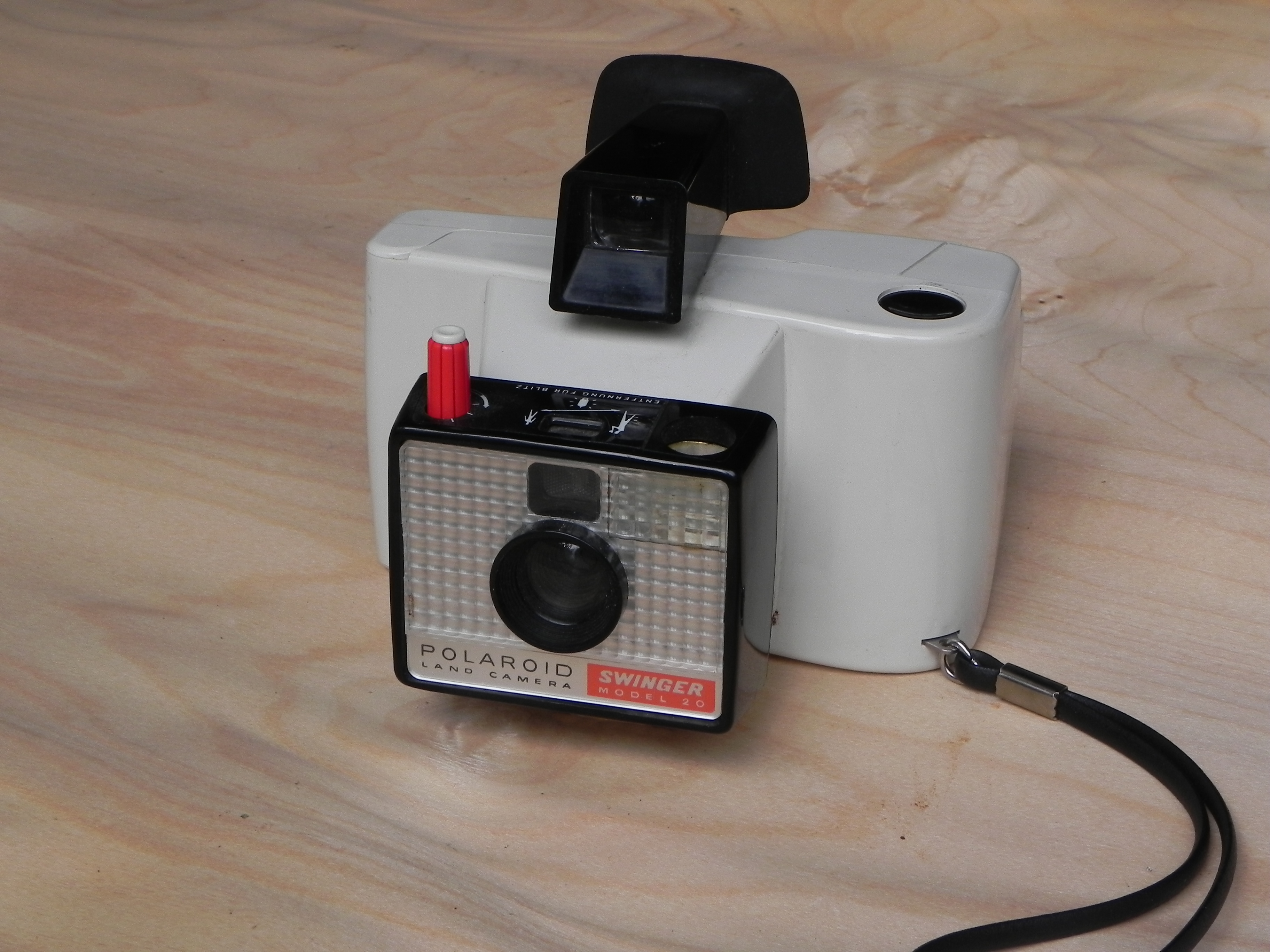 Polaroid Swinger Model 20, gebaut 1965 bis 1970, Objektiv 1:17/100 mm, Filformat 83 x 86 mm, Verschluss 1/200 sec. fest.